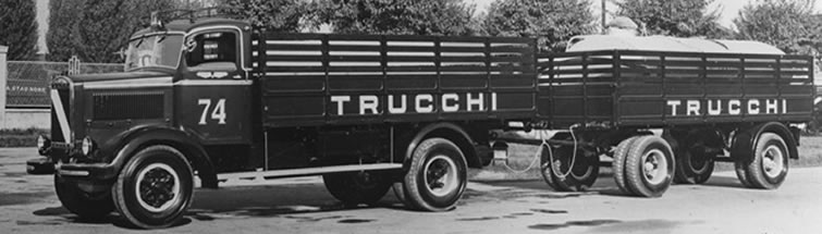 civile